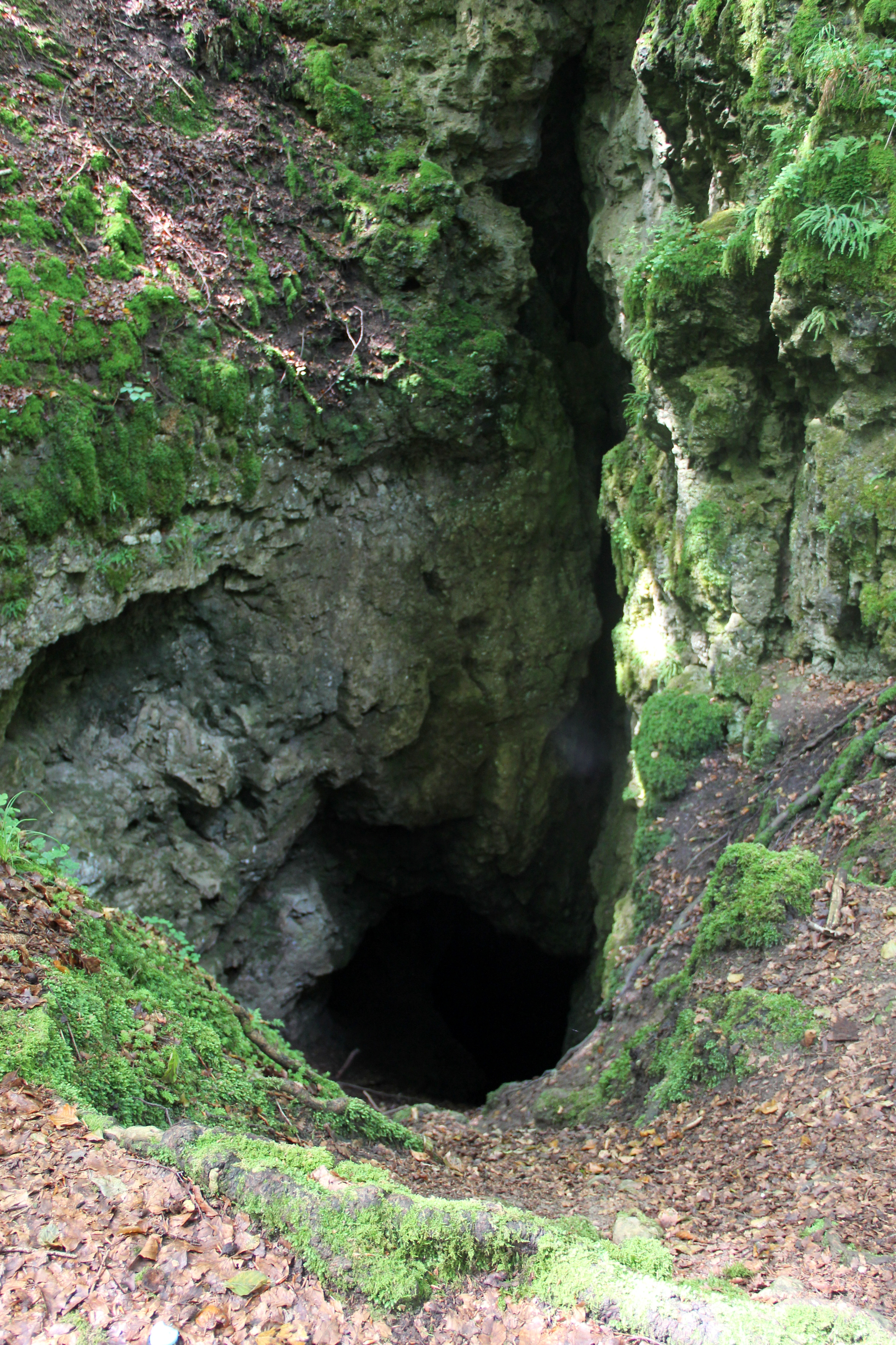 Windloch